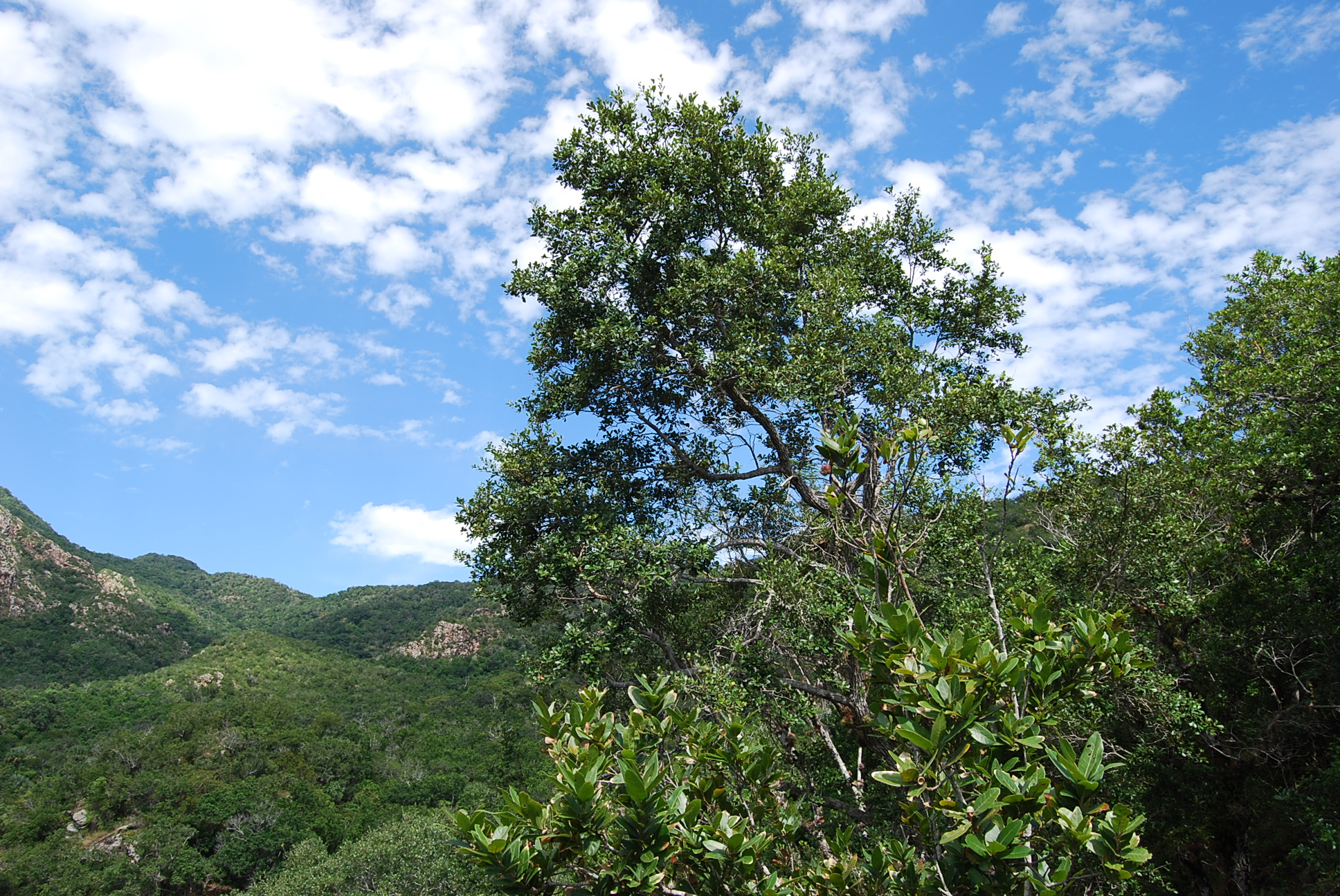 Encinar tropical del centro de Veracruz, México.